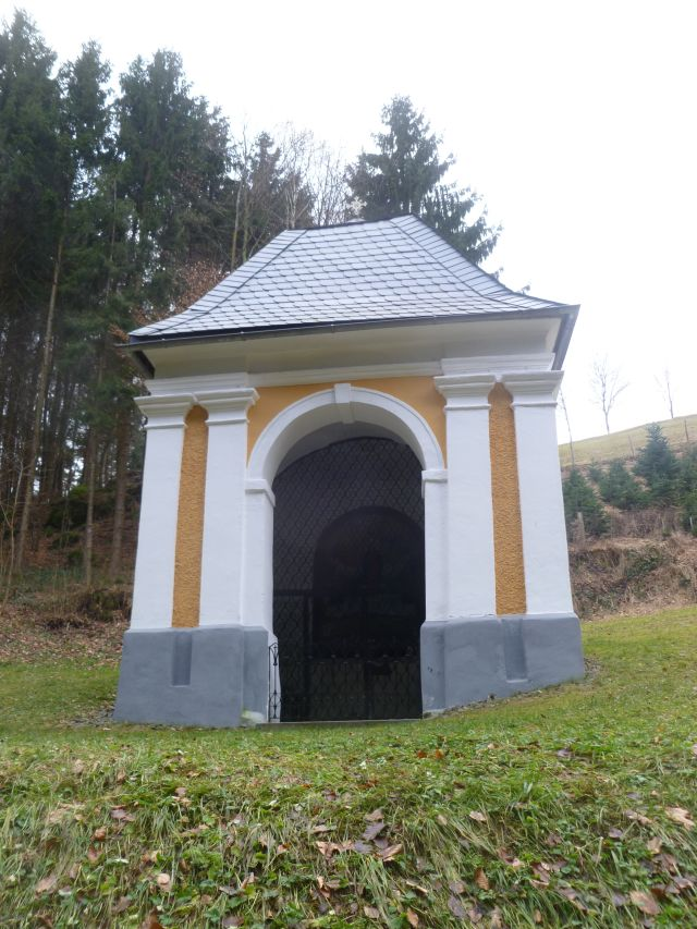 St. Pankratiuskapelle in St. Aegidi, Bezirk Schärding.